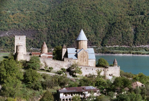 Ananuri Georgia